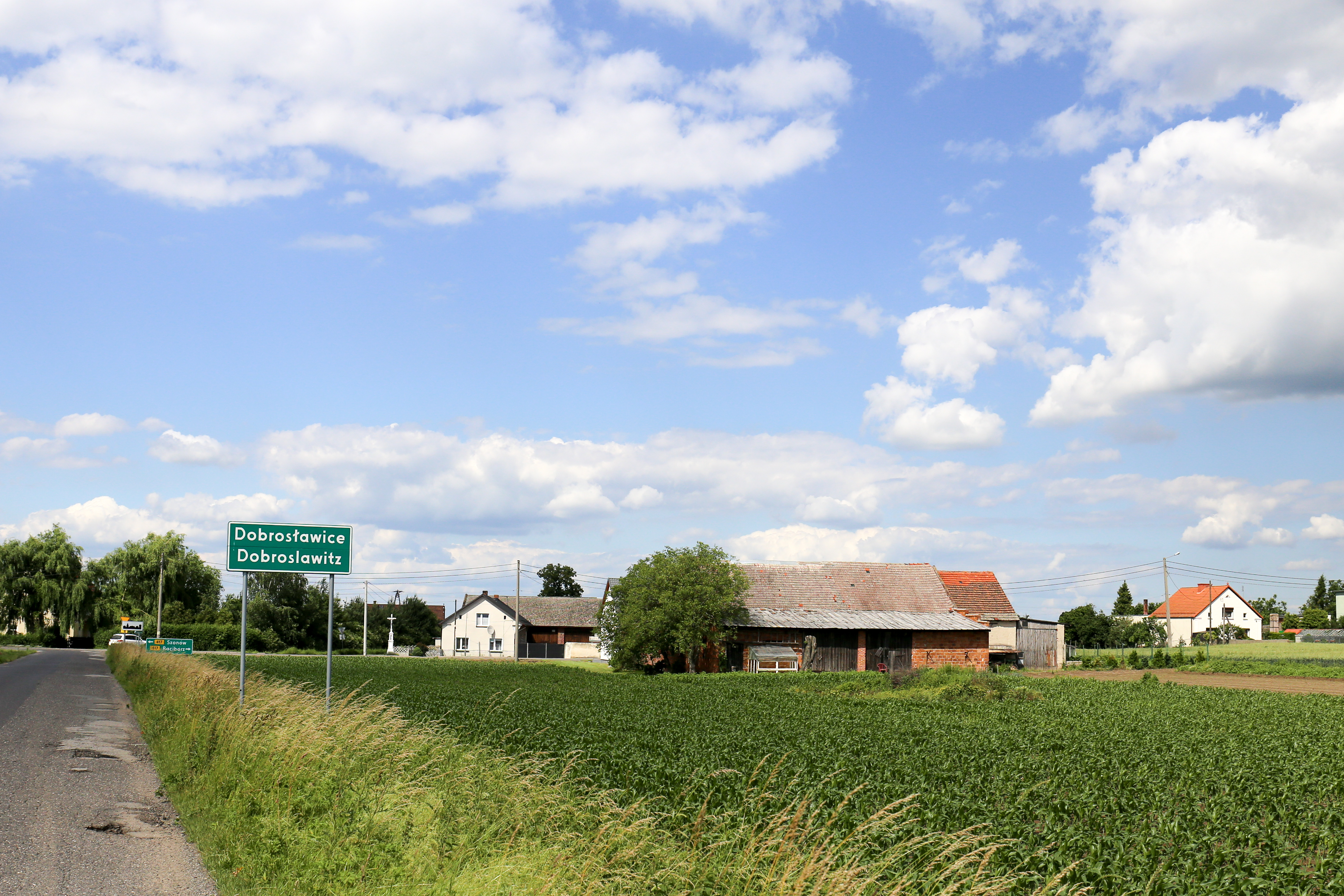 Dobrosławice - wieś w Polsce położona w województwie opolskim, w powiecie kędzierzyńsko-kozielskim, w gminie Pawłowiczki.